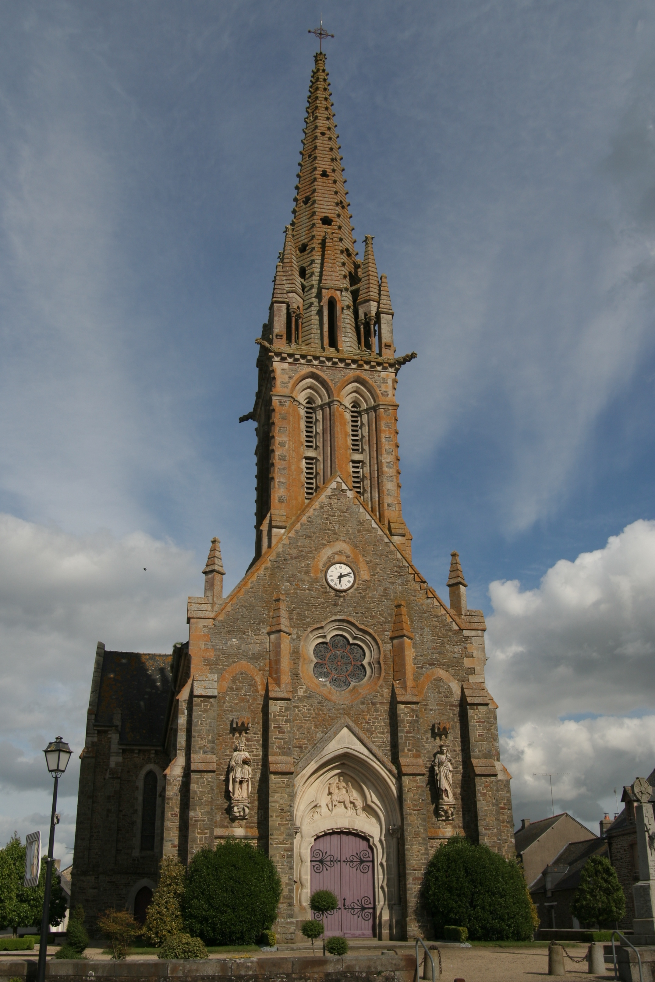 Église Saint-Martin d'Eancé.